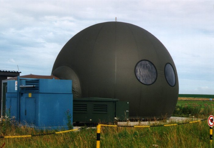 Präzisionsanflugradar auf einem militärischen Flugplatz, das Radom wird durch Überdruck in Form gehalten